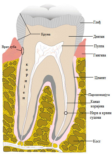 Комплетна структура зуба